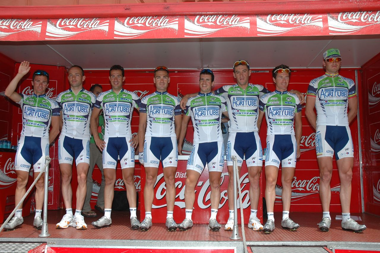 Agritubel, Euskal Bizikleta 2007